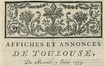 Numéro de périodique d'une collection de 1775-1789